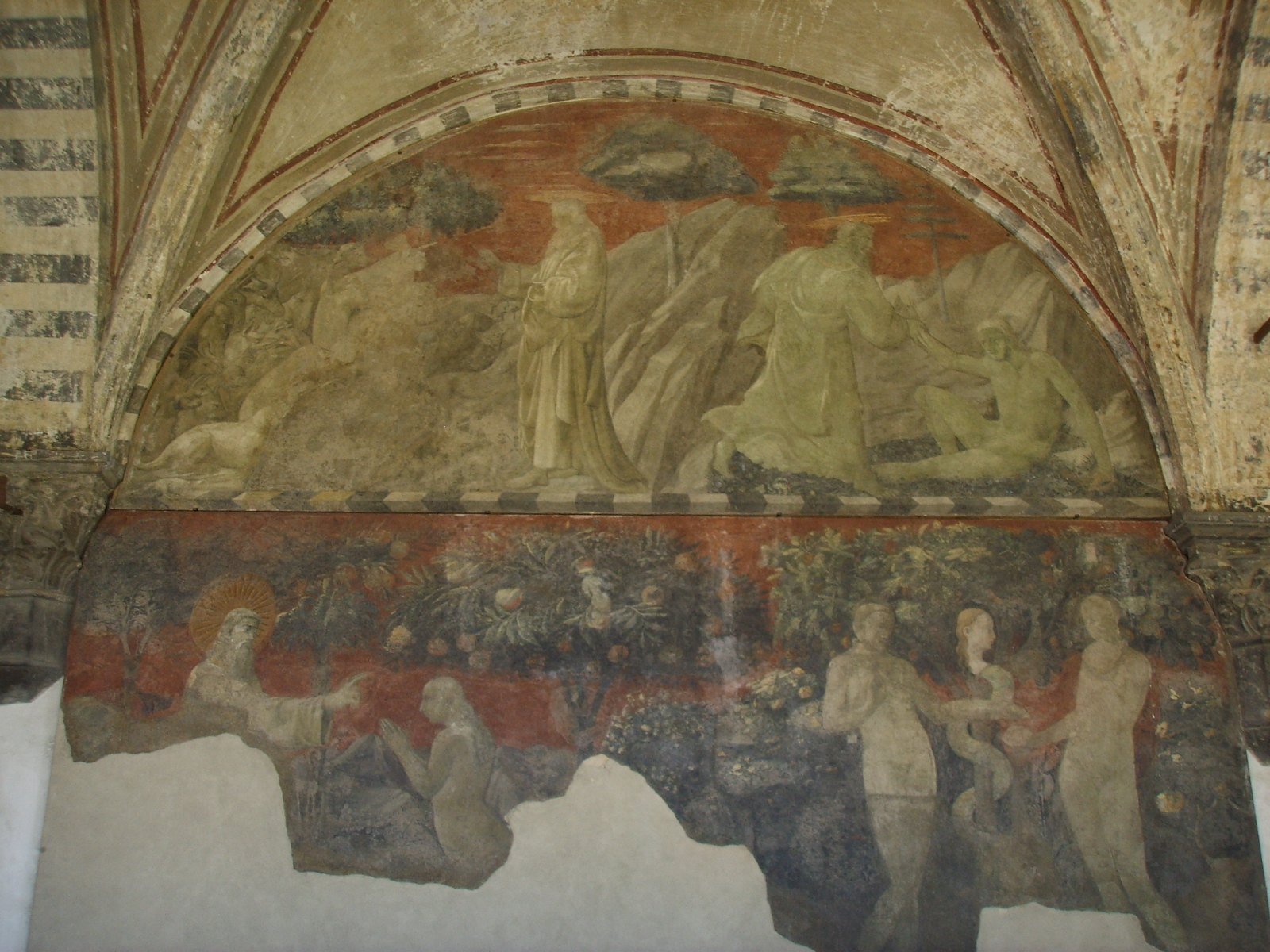 Alttestamentarischer Freskenzyklus zur Genesis im Kreuzgang von Santa Maria Novella in Florenz, Szene in Lünette: Erschaffung der Tiere und Erschaffung Adams, Szene Wandfeld: Erschaffung Evas und Ursünde, Fragmente